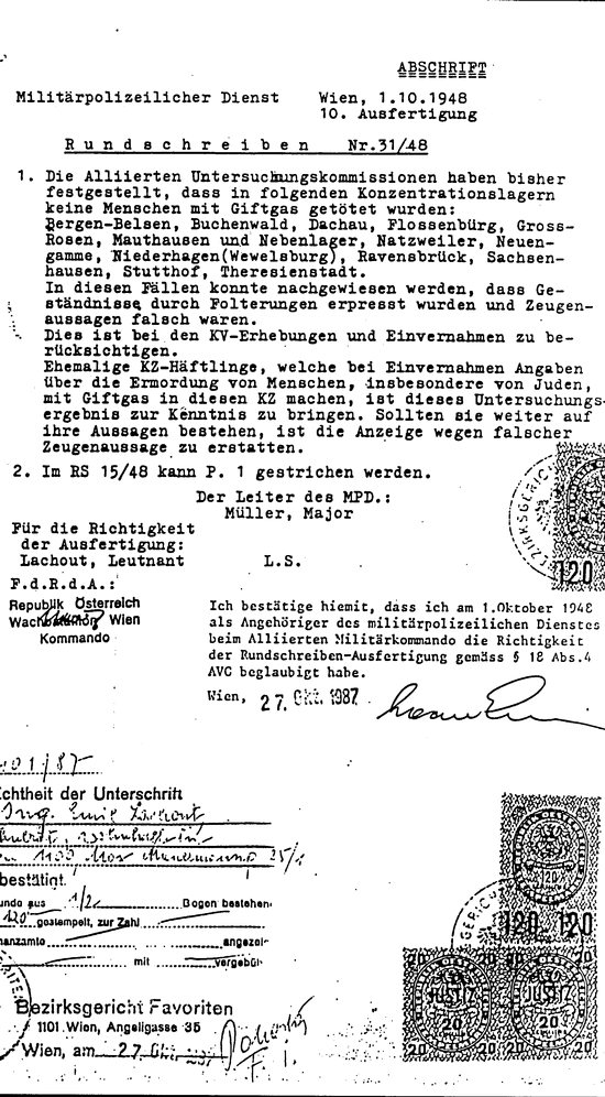 Das Lachout-Dokument ist ein gefälschtes Rundschreiben, mit dem der Einsatz von Giftgas in einer Reihe von Konzentrationslagern (z. B. Mauthausen, Bergen-Belsen oder Groß-Rosen) widerlegt werden sollte.